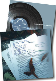 Суперобкладинка і обкладинка книги новел та повісті Олександра Клименка "Supraphon" (видавництво "Твердиня", 2006).